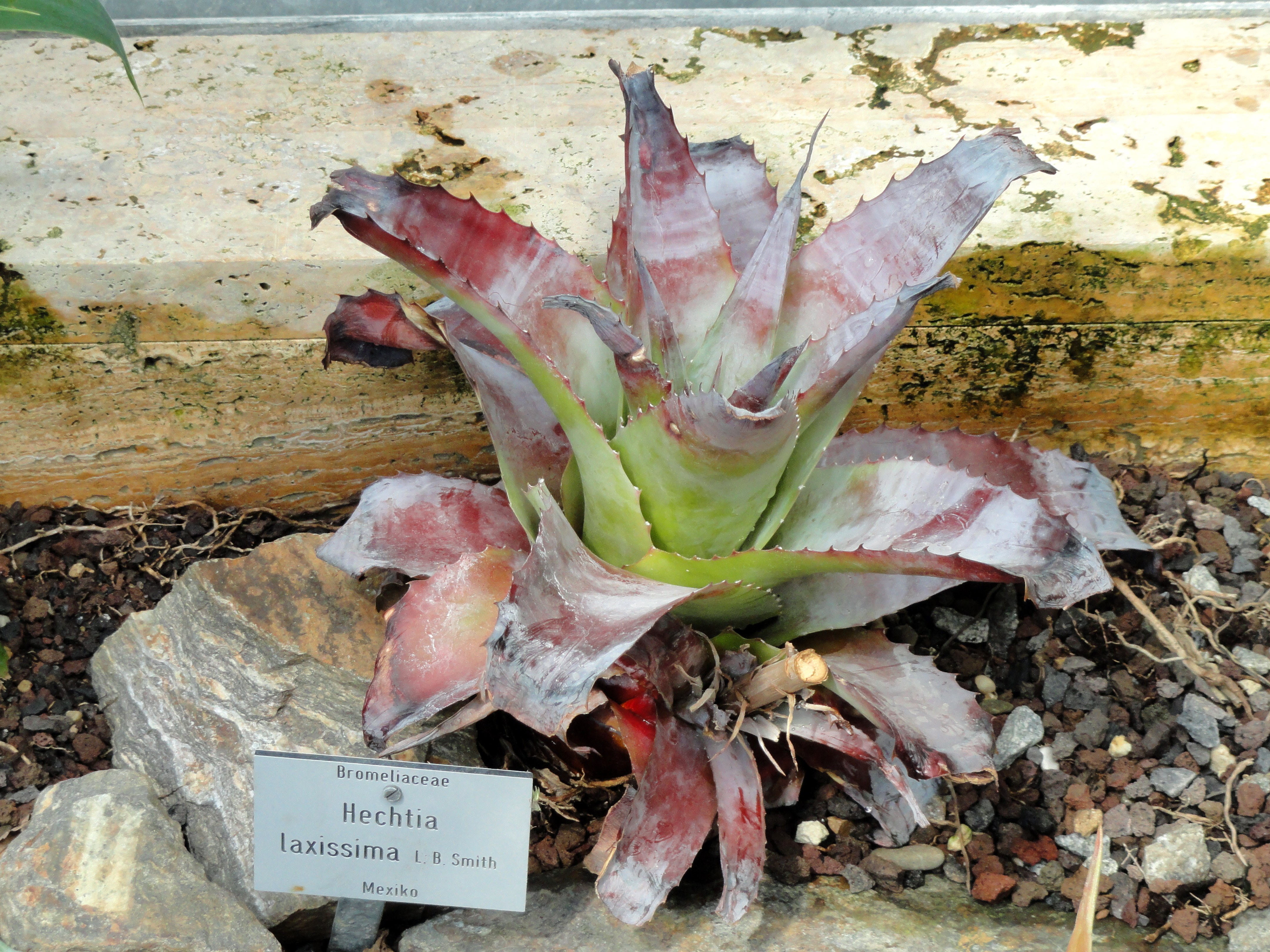 Hechtia laxissima specimen in the Botanischer Garten München-Nymphenburg, Munich, Germany.